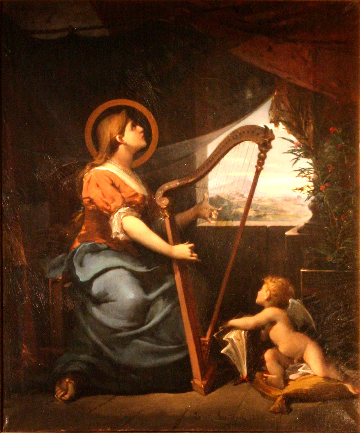 Tableau anonyme montrant sainte Cécile, patronne des musiciens , jouant de la harpe devant un petit amour. Tableau situé sous l'orgue de la basilique de Saint-Victor à Marseille.